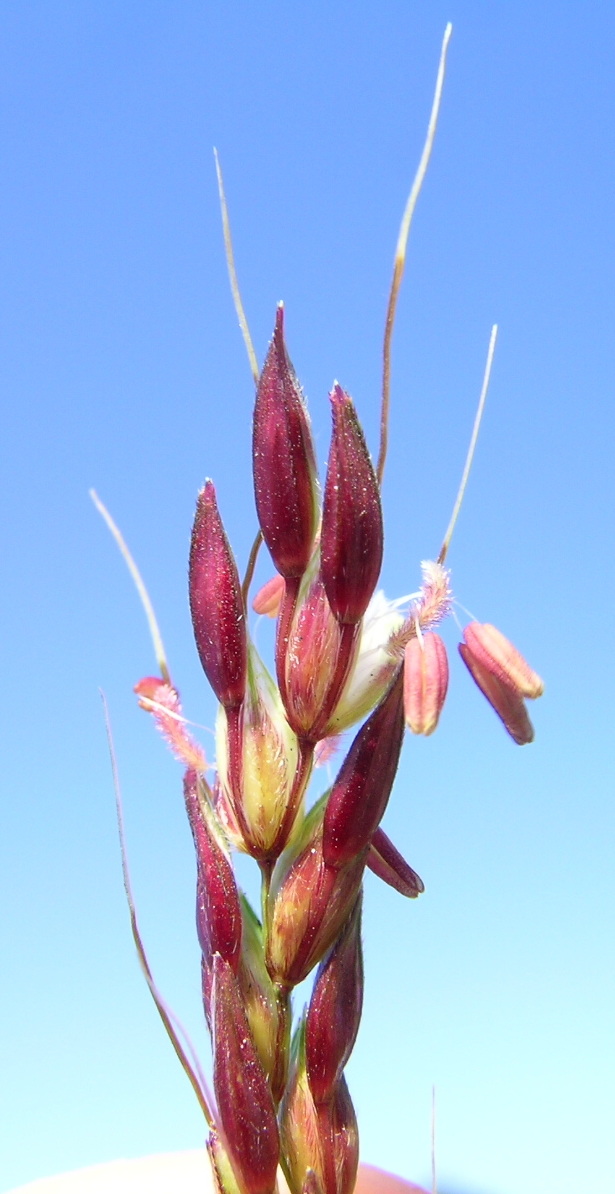 Sorghum halepense spikelets4